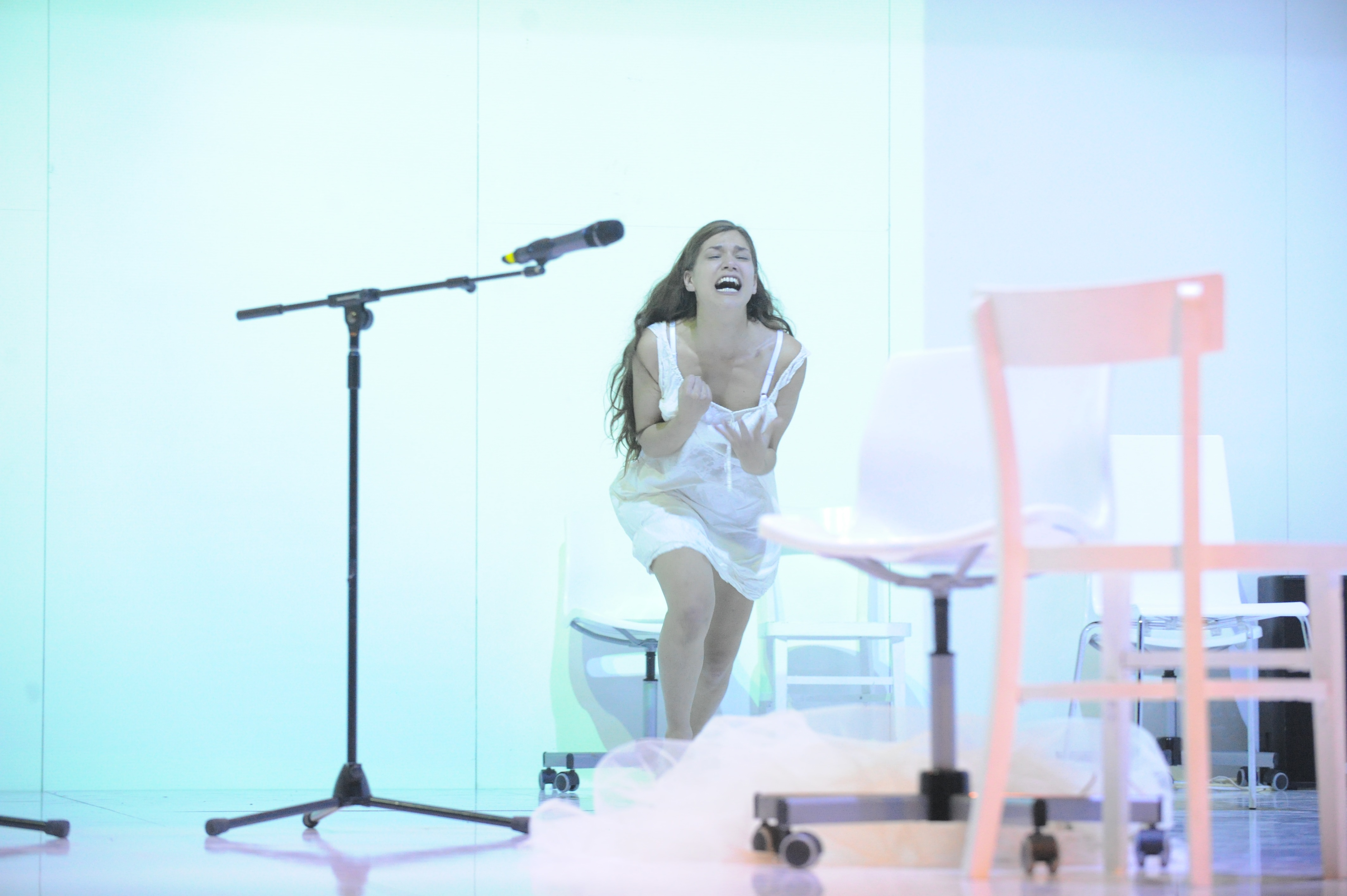 איפגניה מאת: אוריפידס, בימוי : גדי רול, תפאורה: דינה קונסון, תלבושות: פולינה אדמוב, תאורה: פליס רוס, תיאטרון באר שבע, 2012